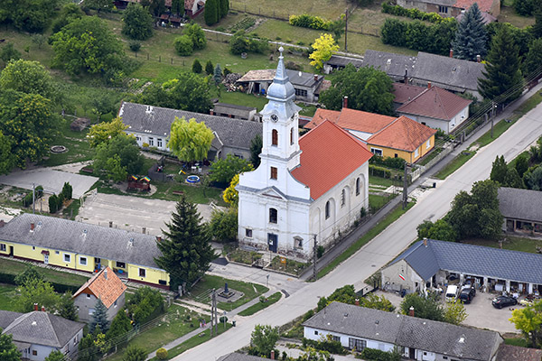 Csajág temploma légi fotón